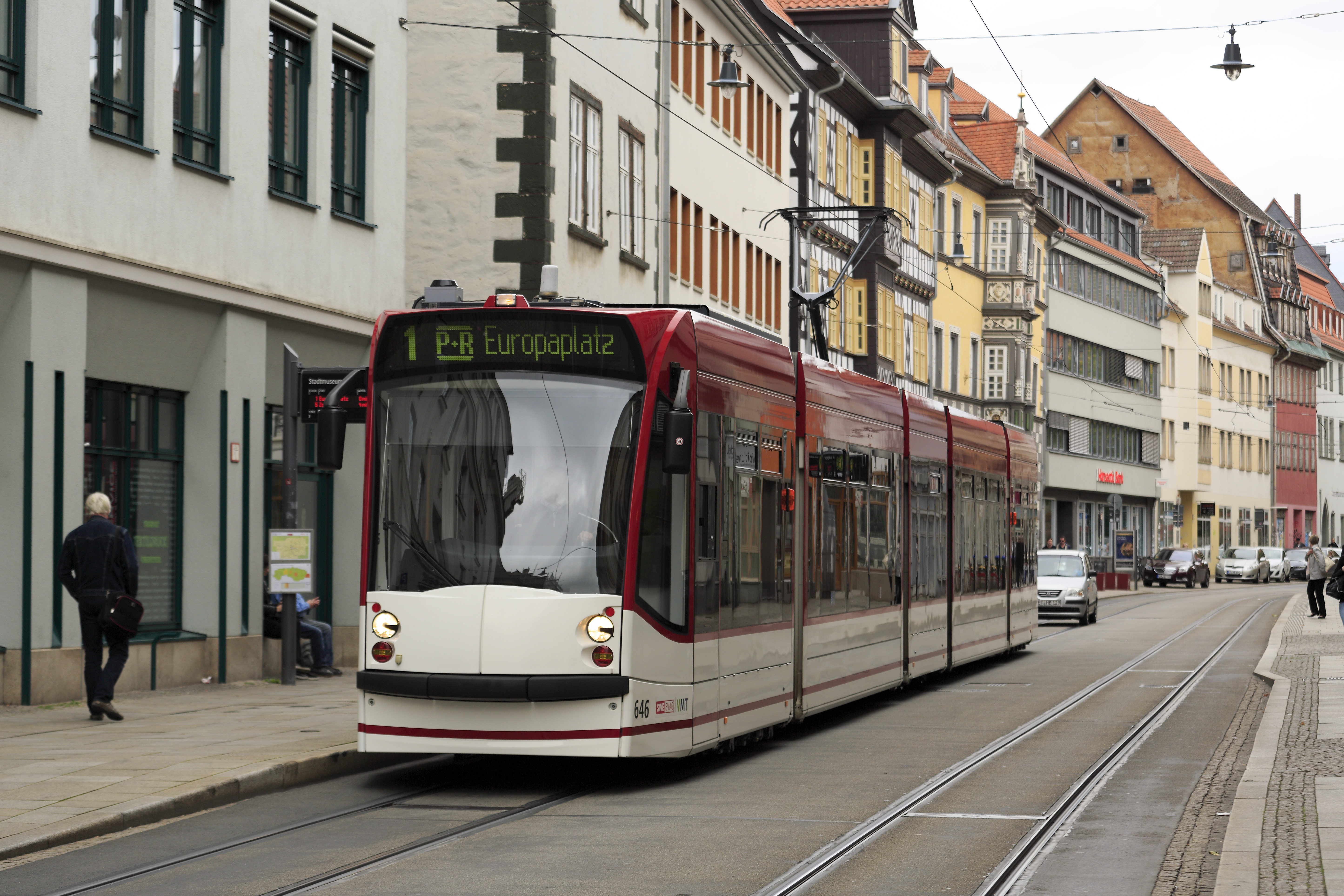 Combino Advanced (fünftelig), Zug der Linie 1 zum Europaplatz